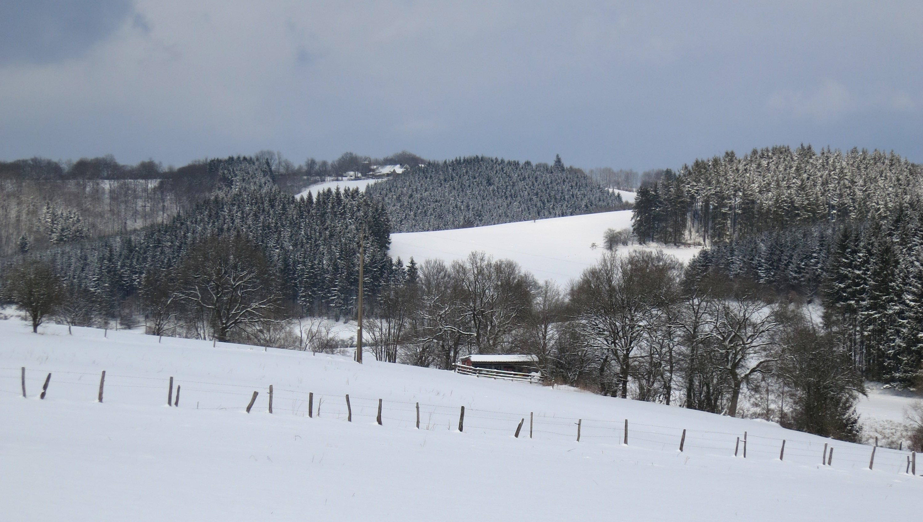 Krewinkel Büllingen